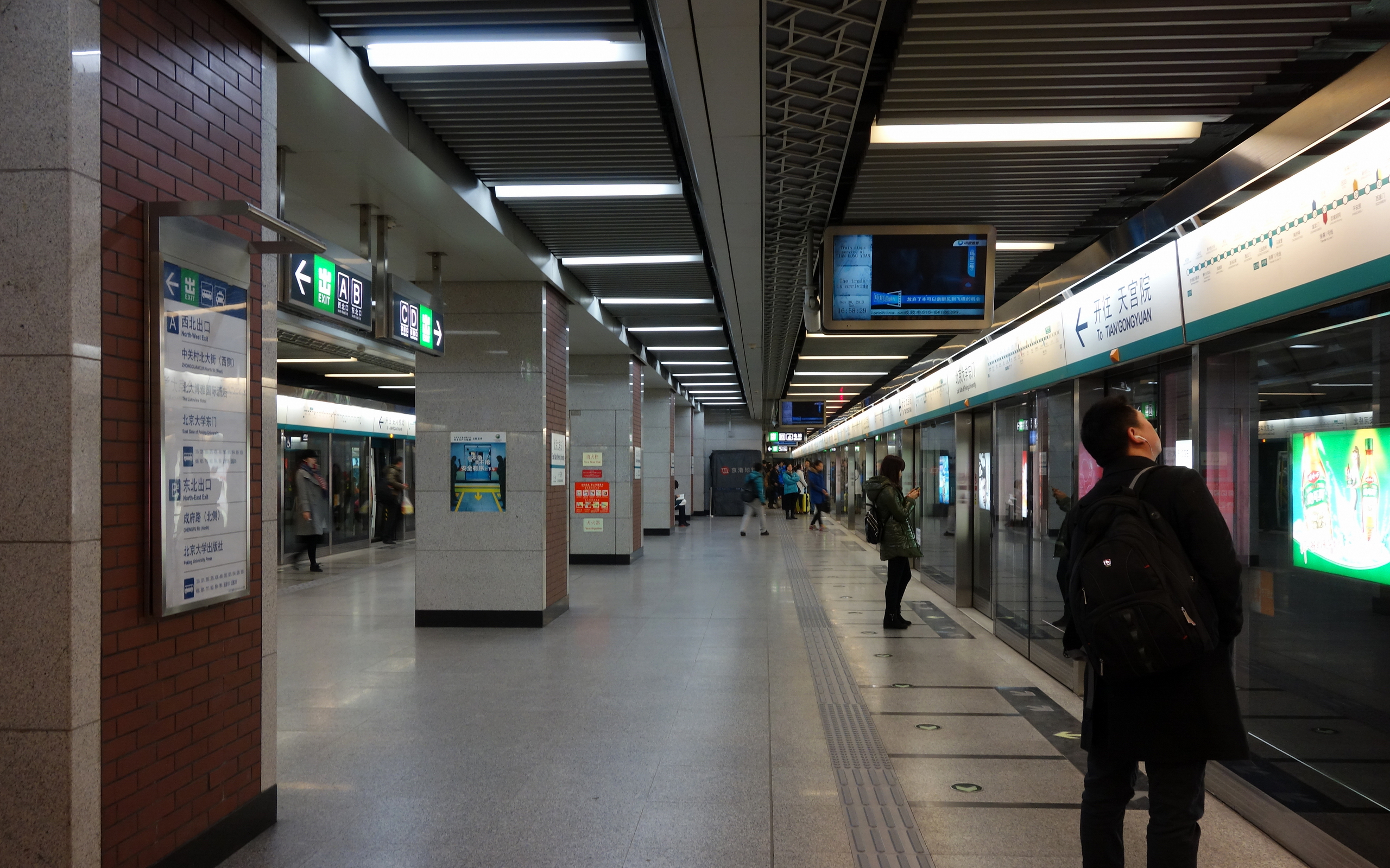 北京地铁4号线北京大学东门车站岛式站台